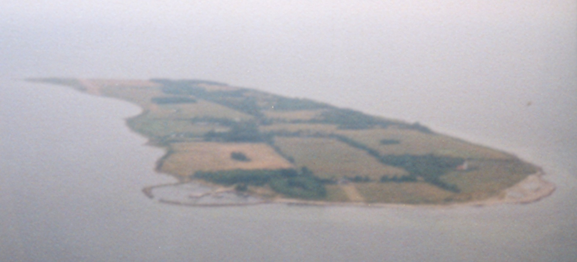 Luftbild der dänischen Insel Vejrö